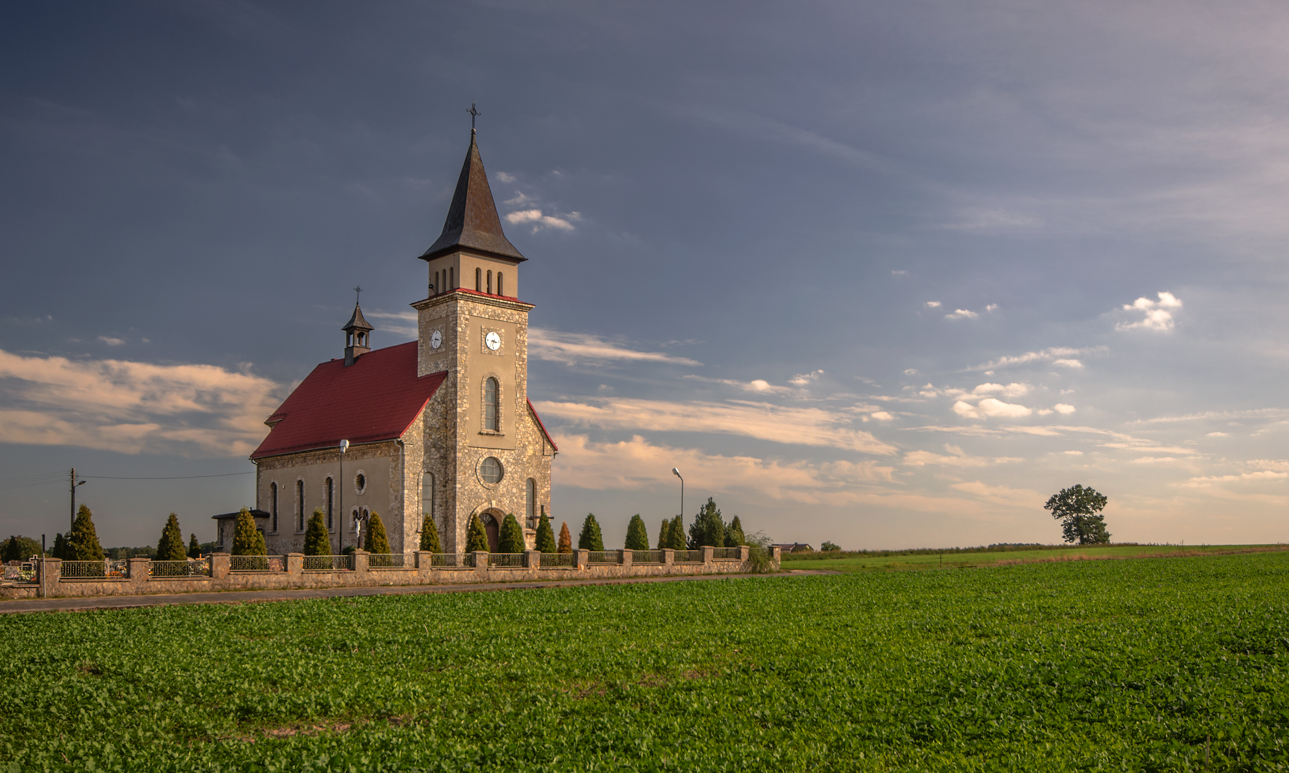 Kościół Wniebowzięcia Najświętszej Marii Panny, Borki Małe, gm. Lasowice Wielkie, pow. Kluczborski, woj. opolskie